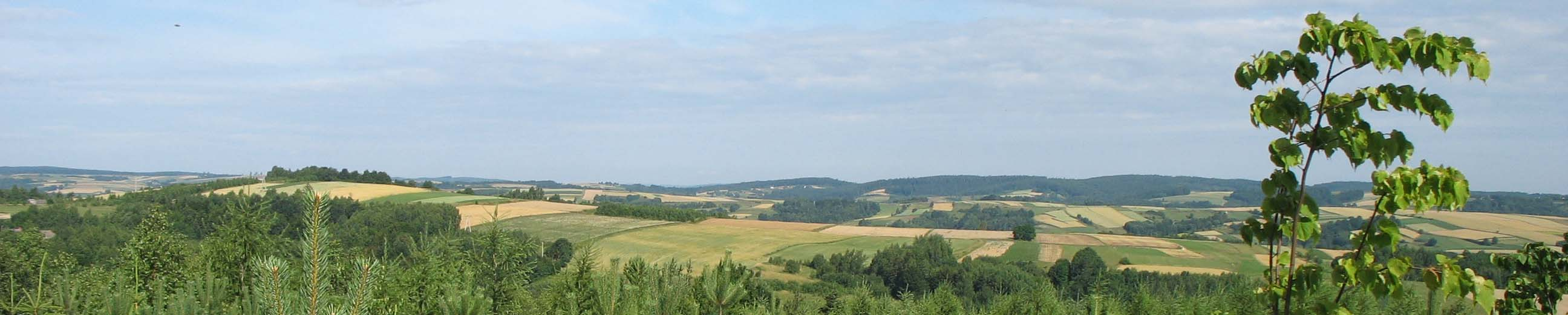 Pogórze Rzeszowskie (Poland)